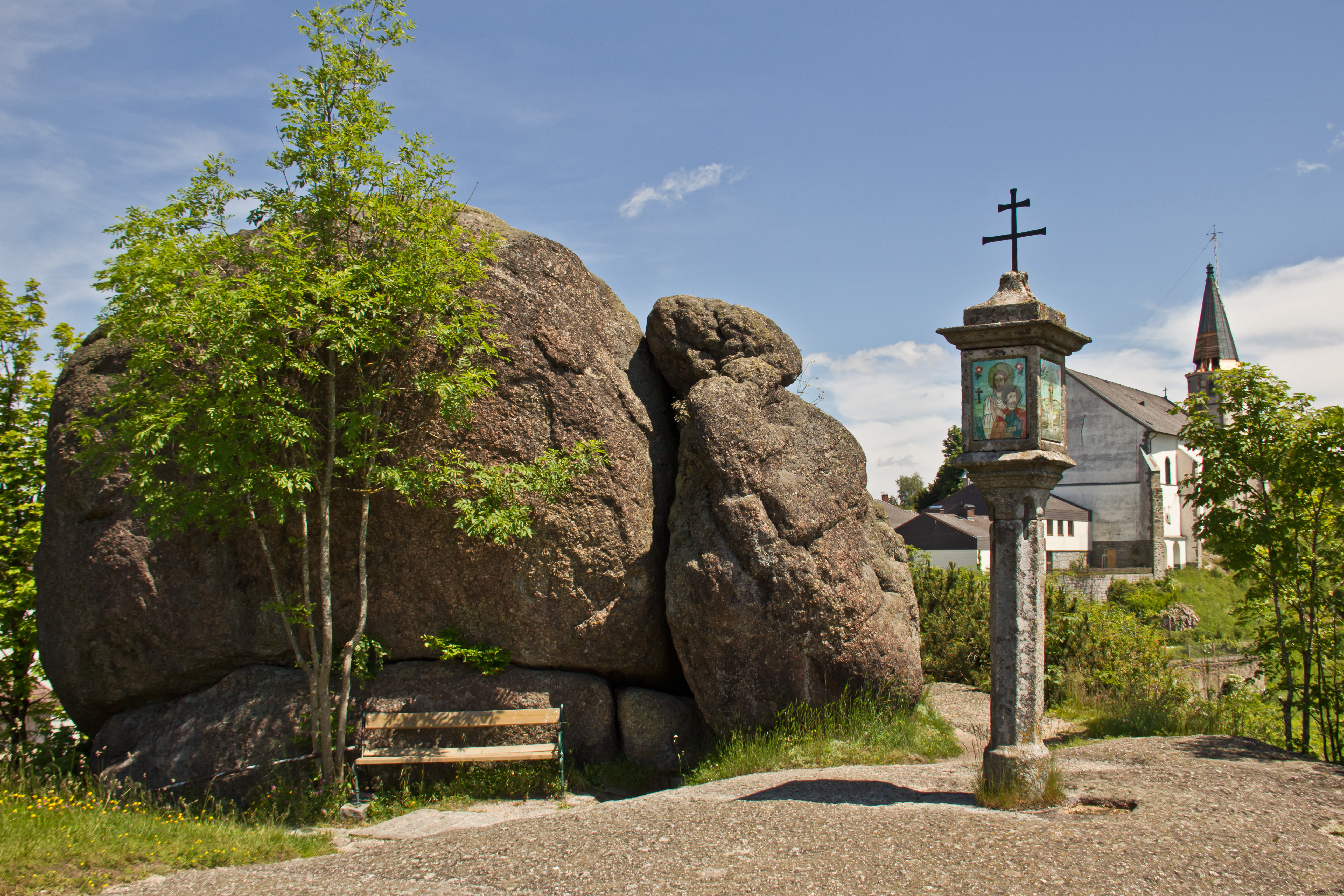 Die Bucklwehluckn, eine der vielen Sehenswürdigkeiten in St Thomas am Blasenstein